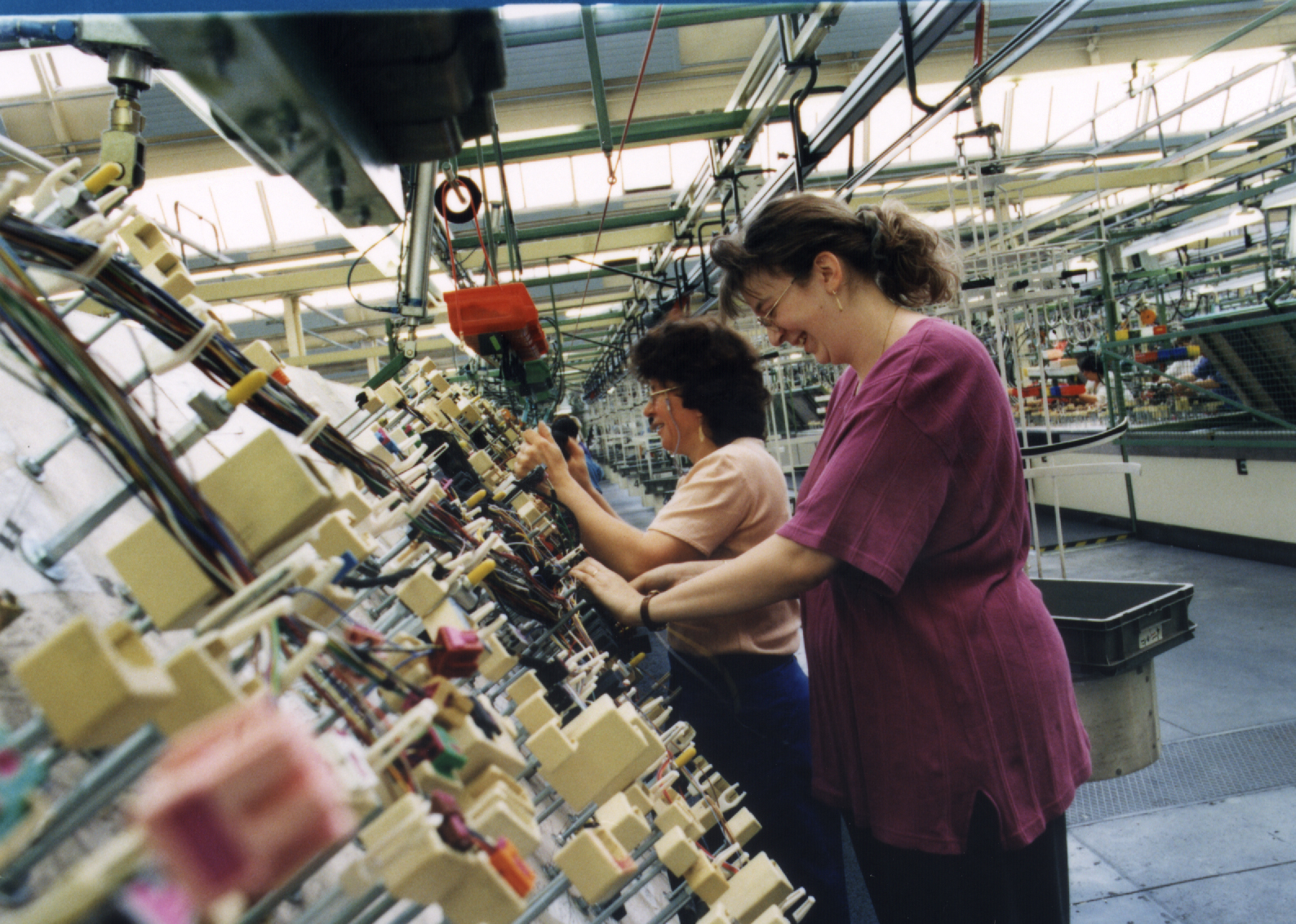 Dräxlmaier 1999 Produktion